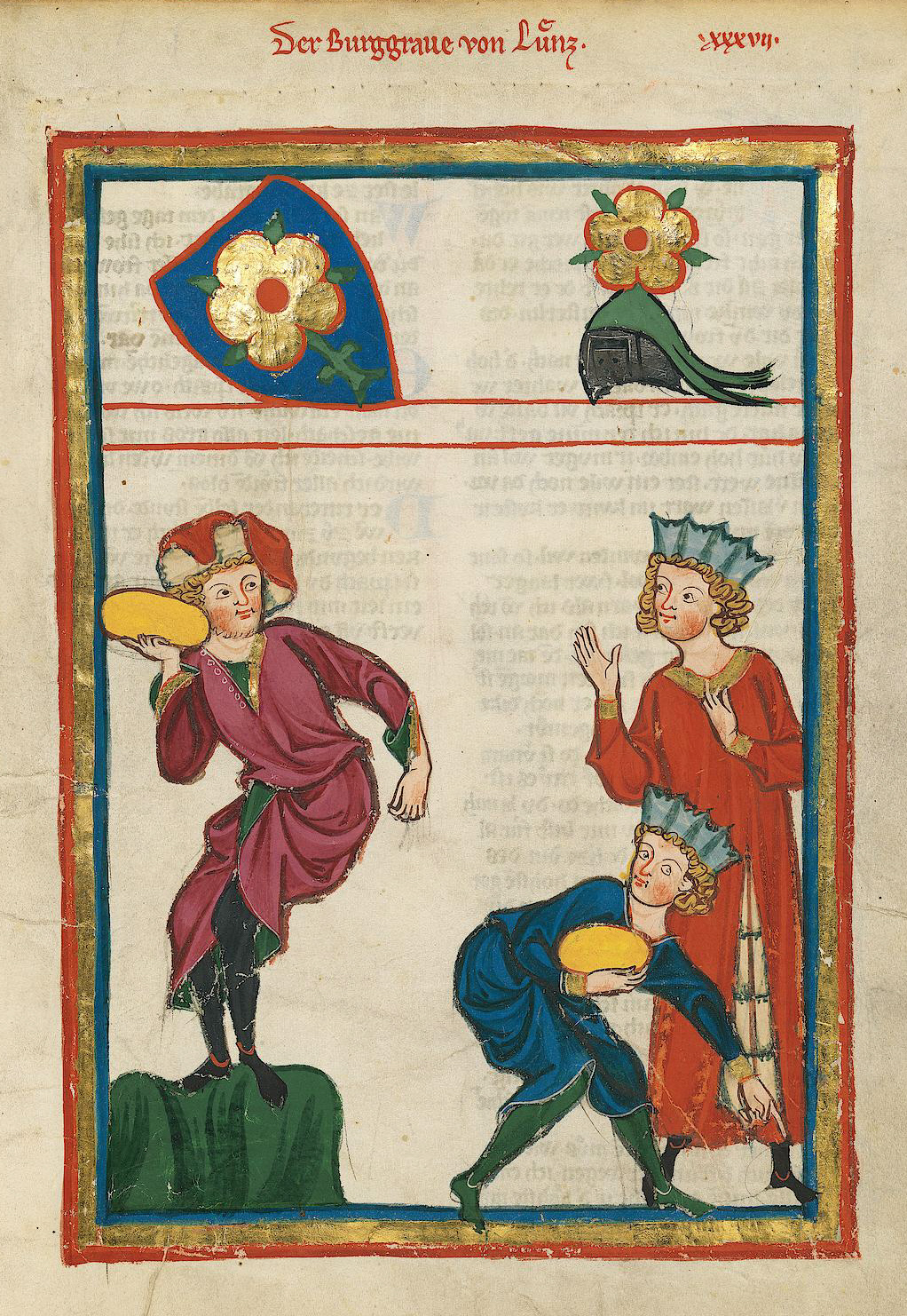 Codex Manesse, UB Heidelberg, Cod. Pal. germ. 848, fol. 115r: Burggraf von Lienz, beim sportlichen Steinstoßen